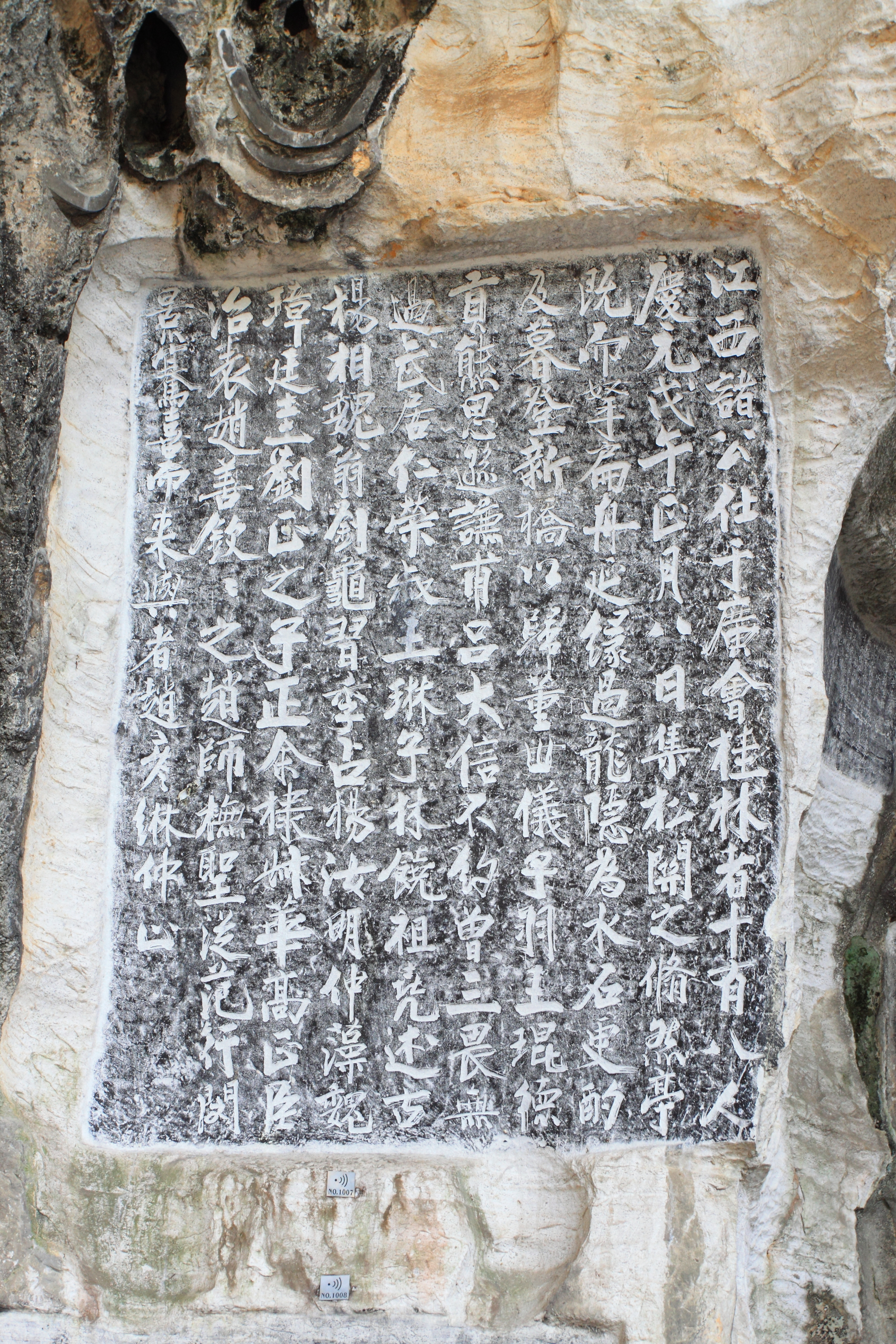 龙隐岩龙隐洞摩崖石刻